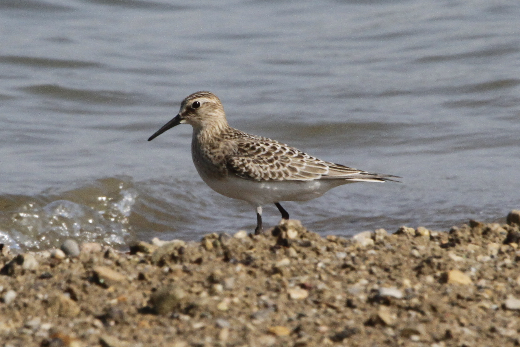 Baird's Sandpiper Calidris bairdii, juvenile, Deer Creek State Park beach, Ohio. eBird Checklist